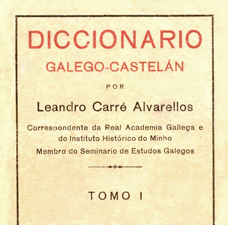 Diccionario galego-castelán. Tomo I.